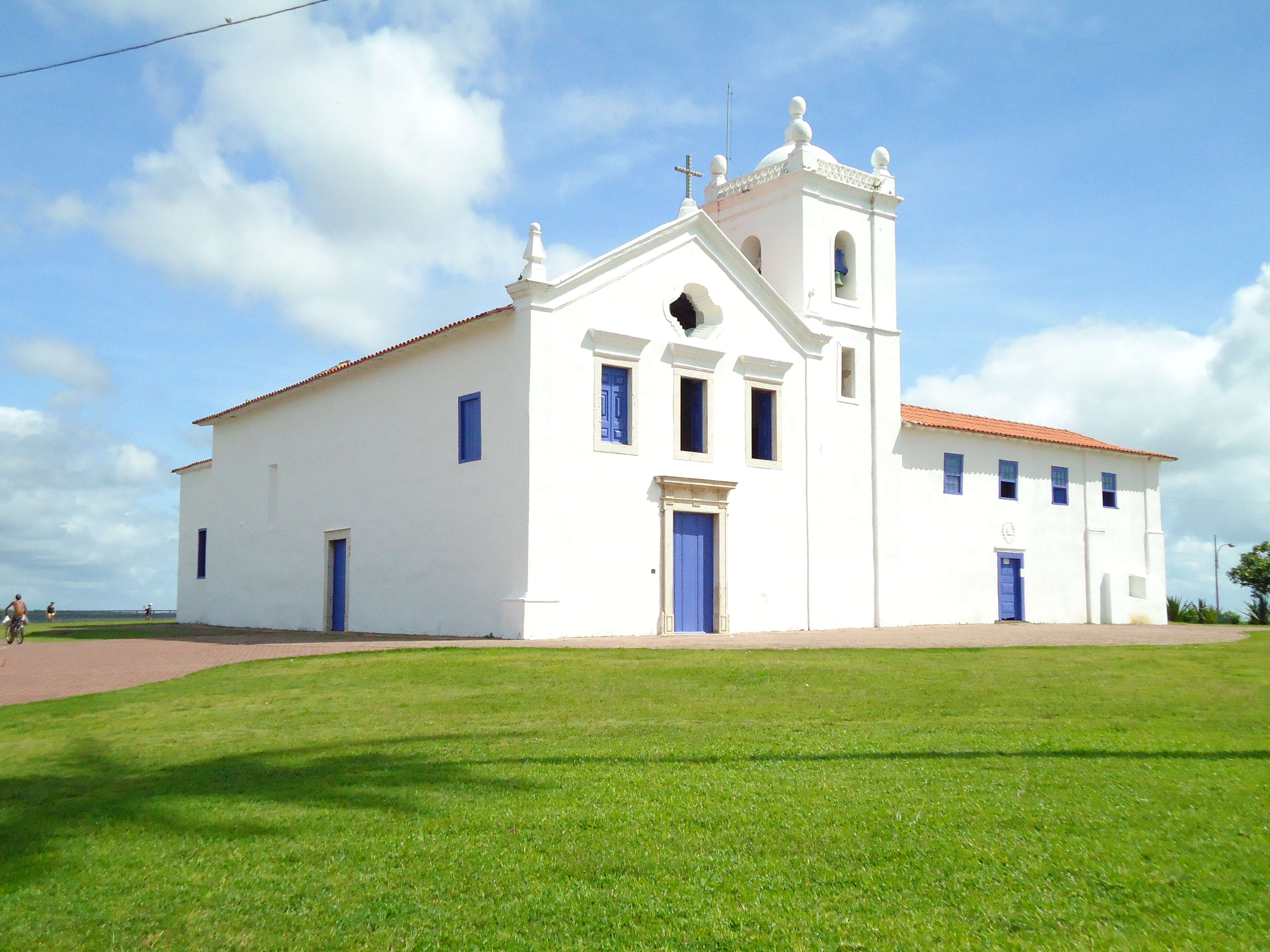 Igreja dos Reis Magos e residência